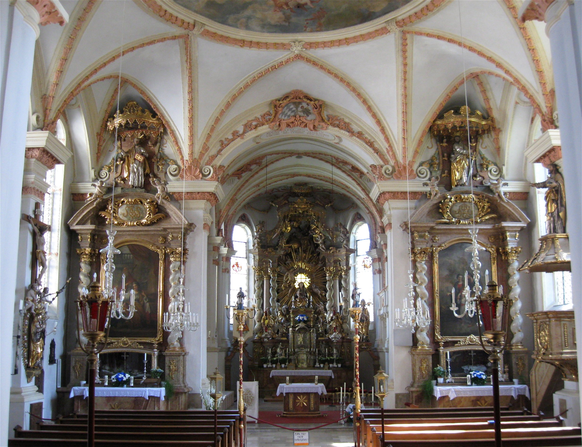 Fraunbergplatz 1. Kath. Pfarr- und Wallfahrtskirche St. Maria Thalkirchen, im Kern um 1400 mit romanischen Resten, 1692 umgebaut, 1907-08 von Gabriel von Seidl neubarock erweitert; mit Ausstattung; ringsum der ehem. Friedhof mit alter Mauer und alten Schmiedeeisenkreuzen.